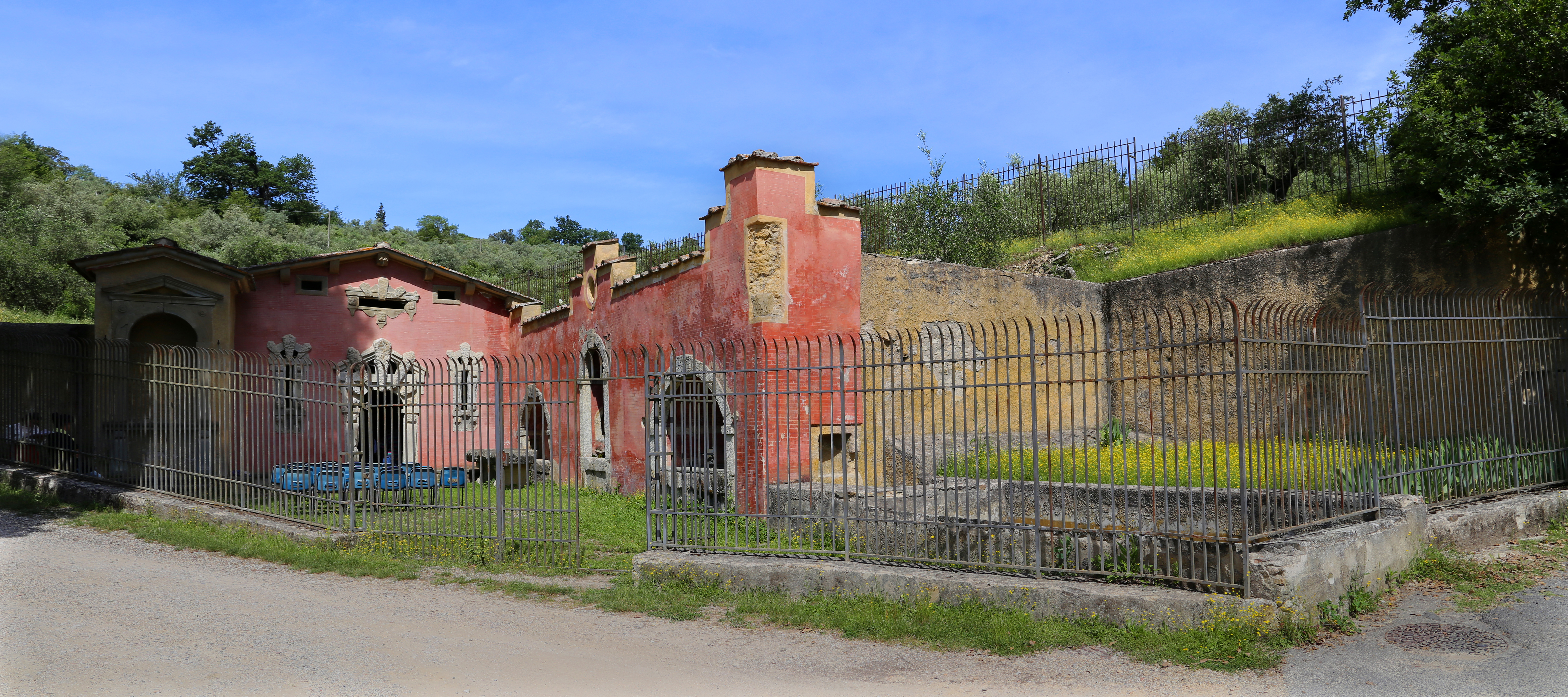 Fonte della Fata Morgana This is a photo of a monument which is part of cultural heritage of Italy.